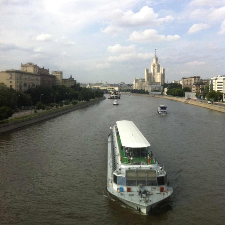 Вид на Москва-реку с Большого Краснохолмского моста